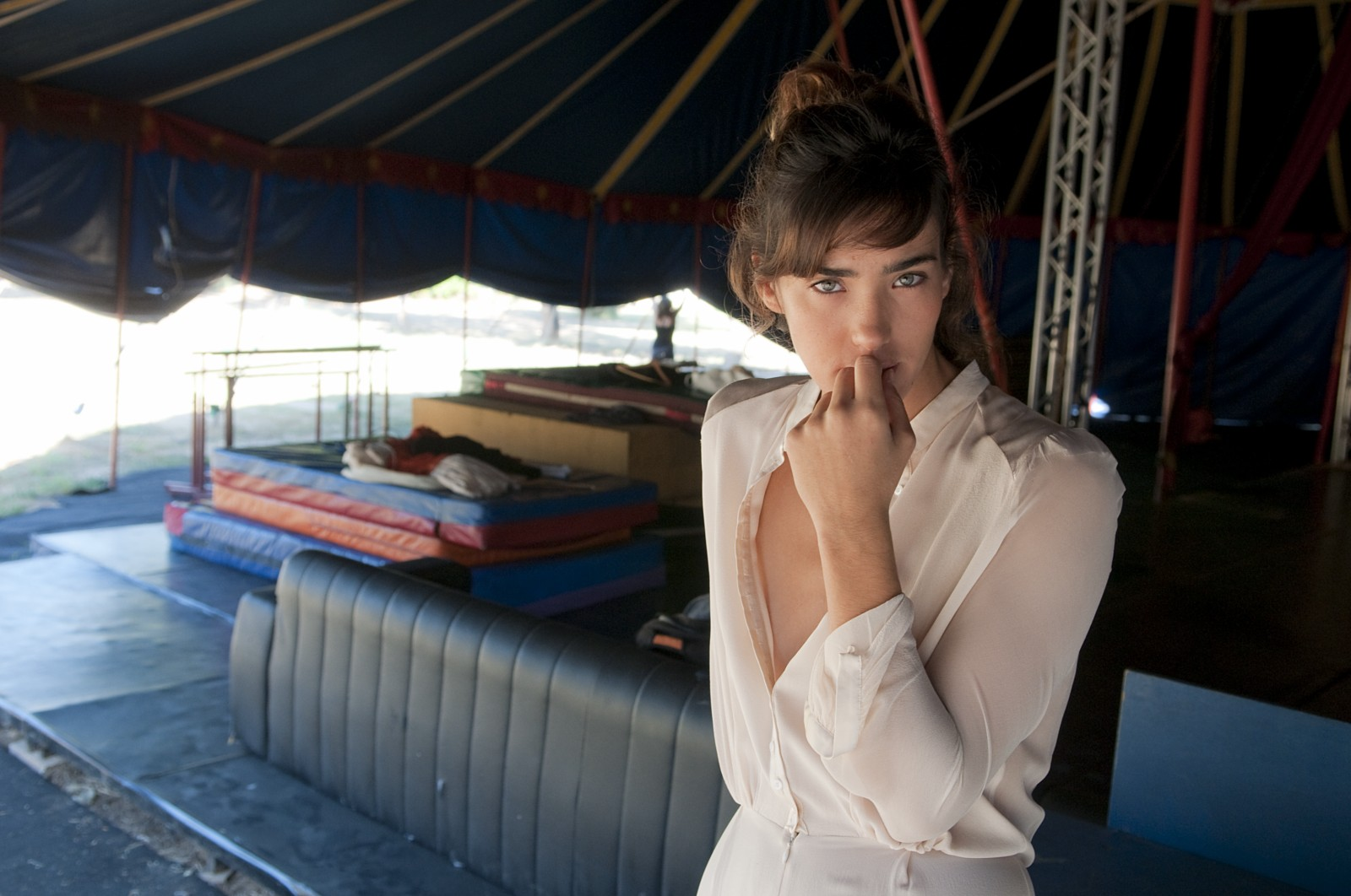 חן יאני